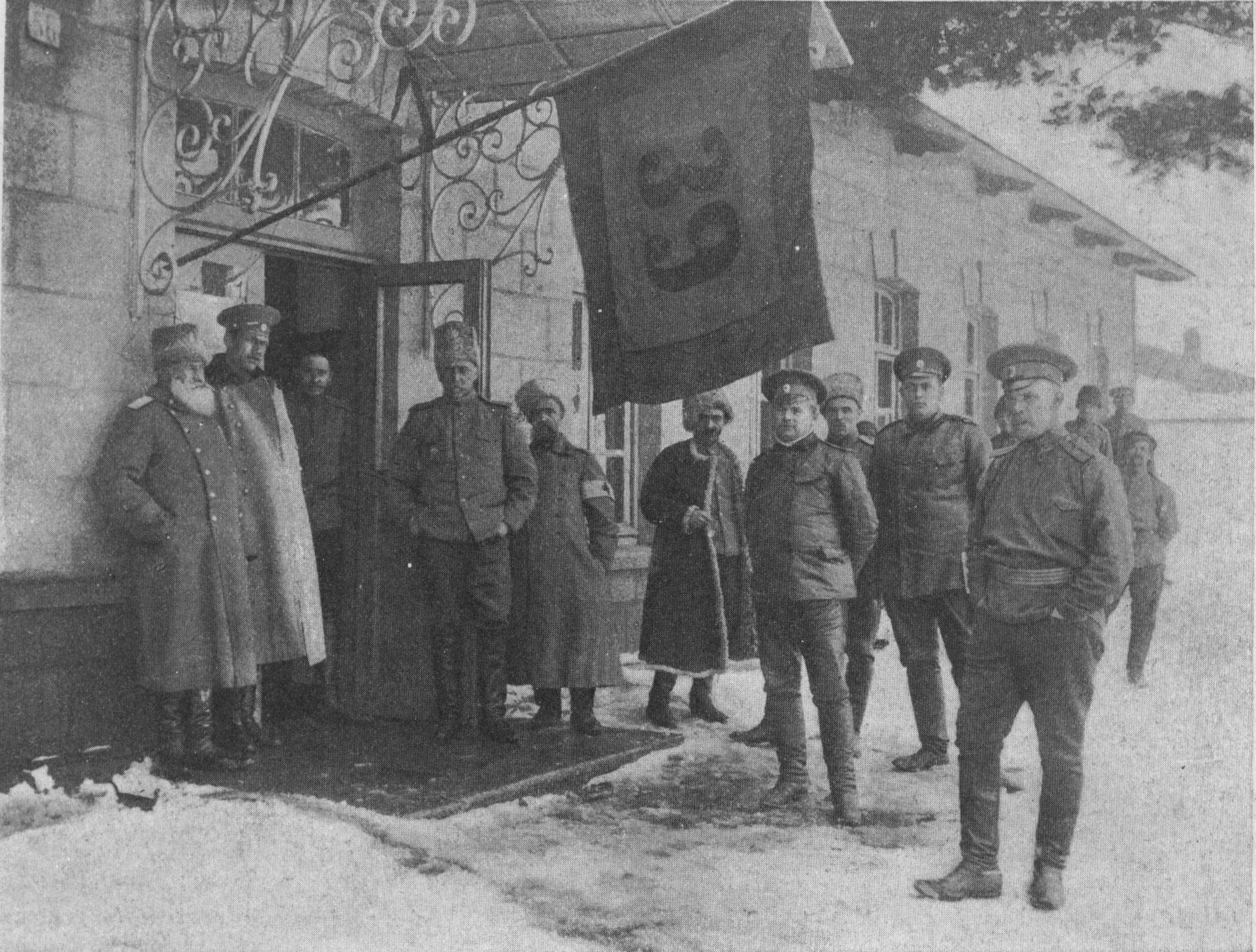 Russian general De-Vitt with his staff of 39th infantry division. Генерал Де-Витт со штабом 39-й пехотной дивизии. Сарыкамыш.